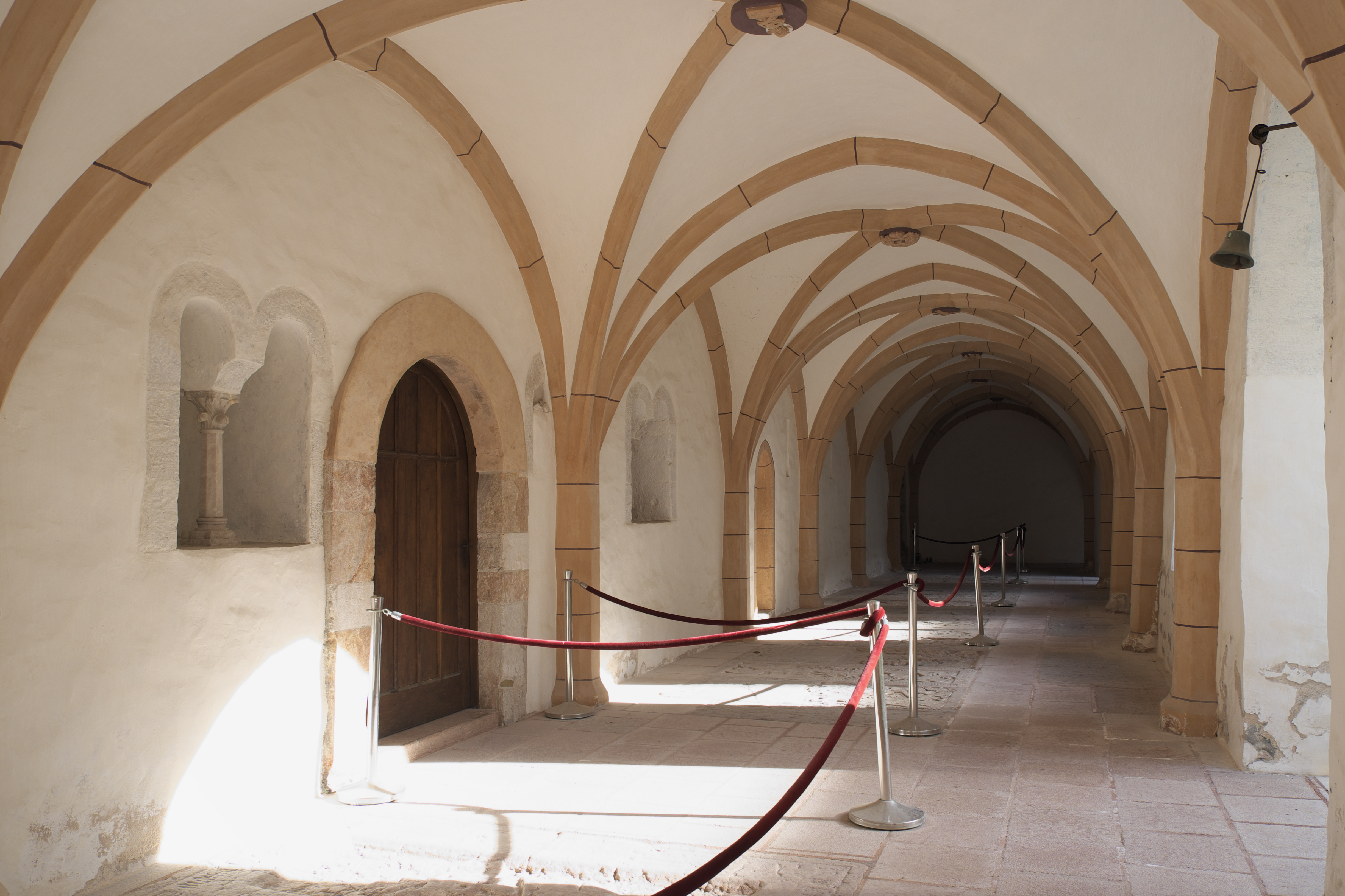 Kloster St. Zeno in Bad Reichenhall im Landkreis Berchtesgadener Land (Bayern/Deutschland), Kreuzgang